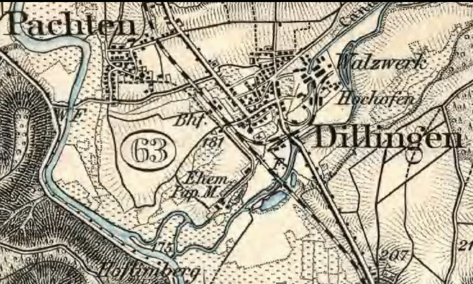 Karte von Dillingen 1893